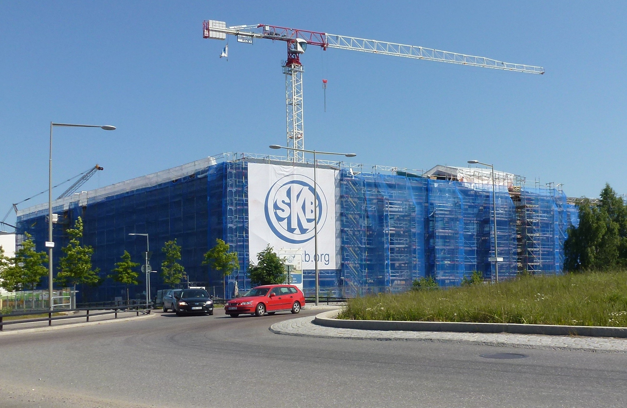 SKB:s bostadsbygge vid Gyllene ratten